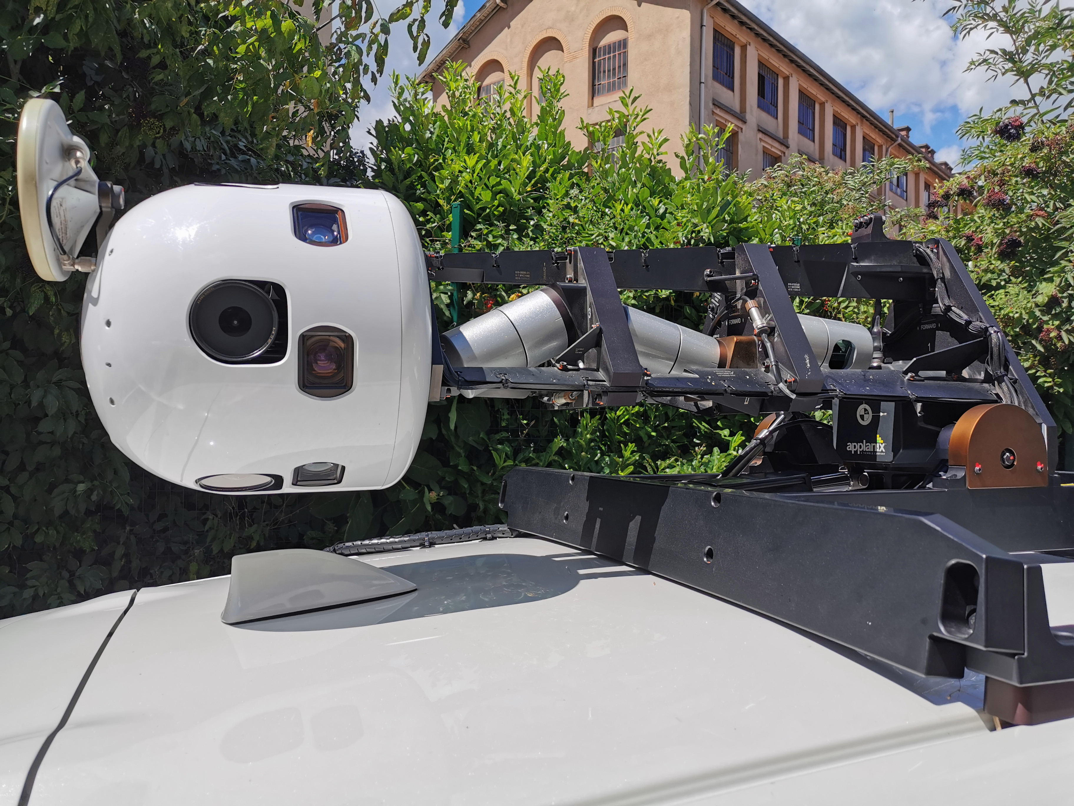 Appareillage de prise de vue d'un voiture Apple Maps à Grenoble